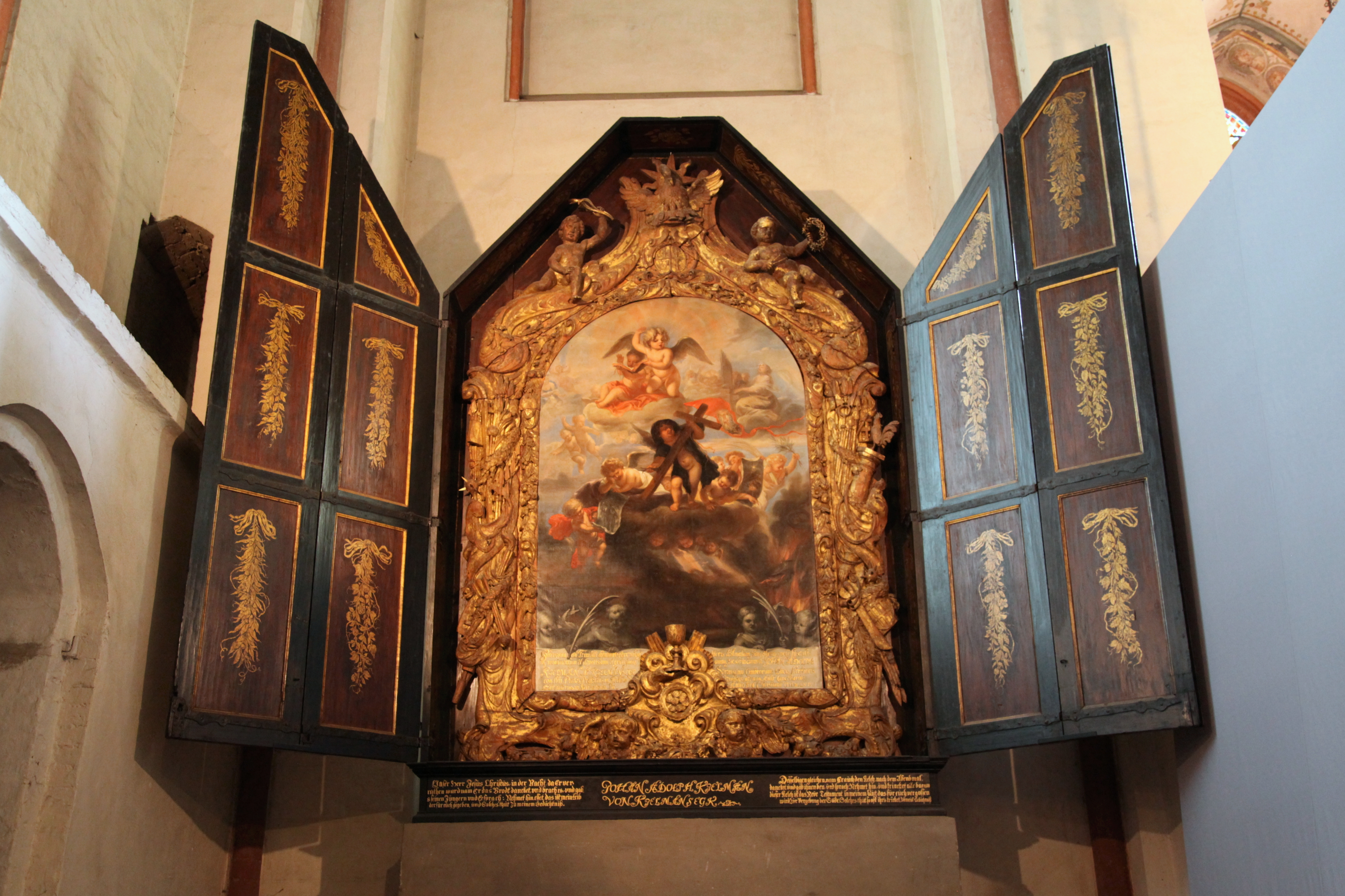 Kielmannseckscher Altar mit dem 1664 von Jürgen Ovens gemalten Bild "Der Sieg des Christentums über Sünde und Tod" im Dom in Schleswig